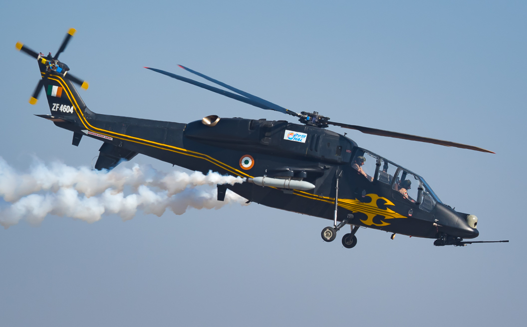 ZF 4604 IAF LCH